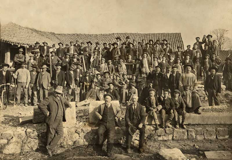 Scalpellini della Predera, Brenno Useria, Lombardia.